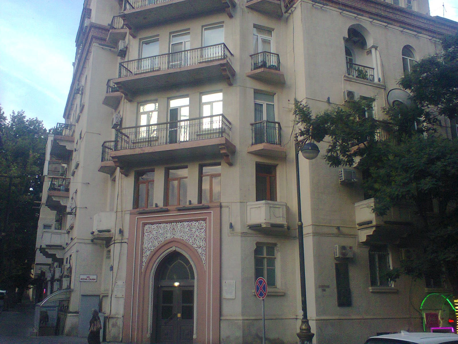 Дом где жили Фуад Эфендиев и Саид Рустамов